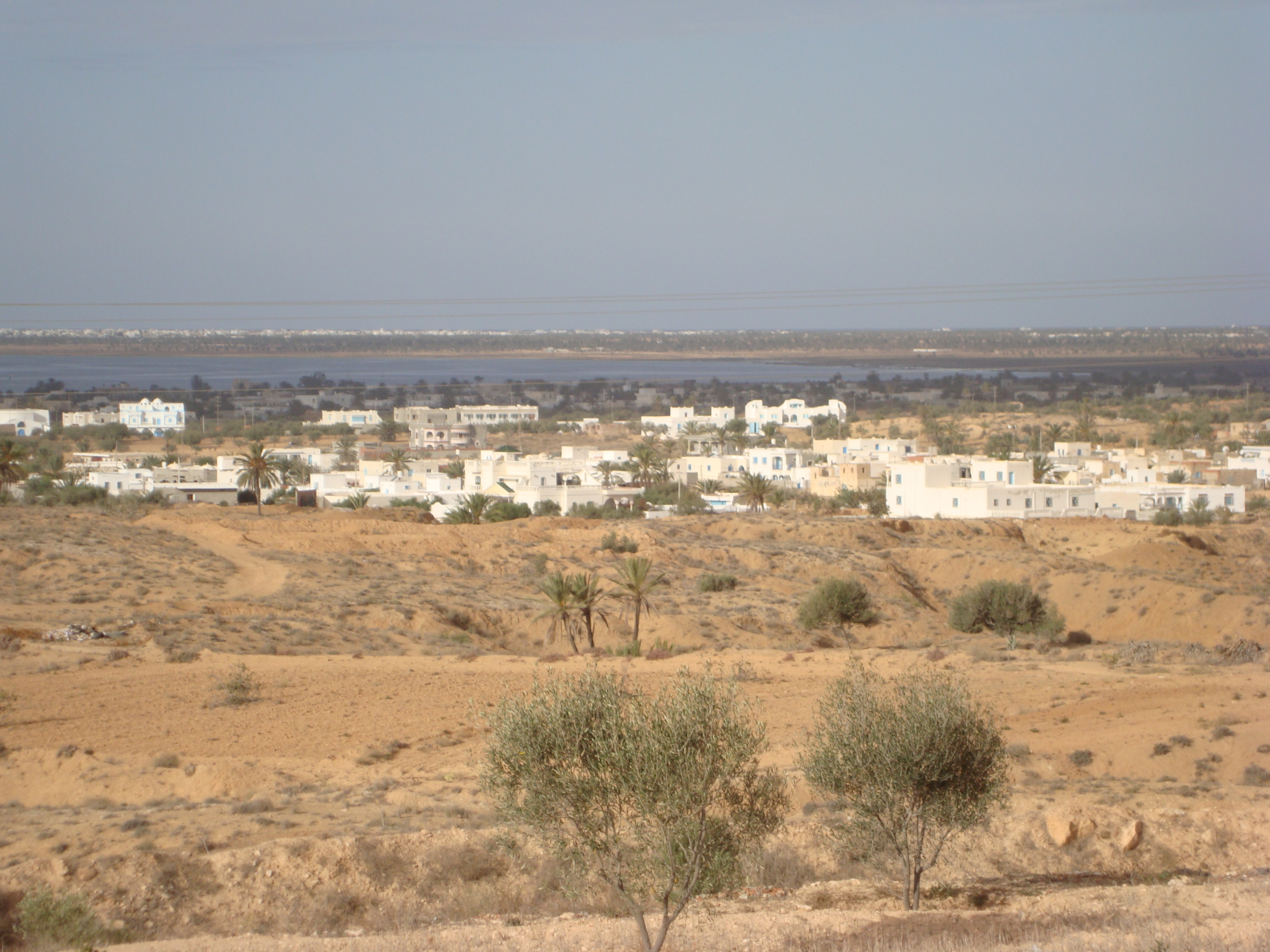 Vue de la ville de Guellala (au fond : le continent) depuis la butte du musée de Guellala.